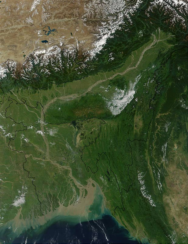 Vue du Bangladesh, de la vallée du Brahmapoutre et des bouches du Gange par satellite